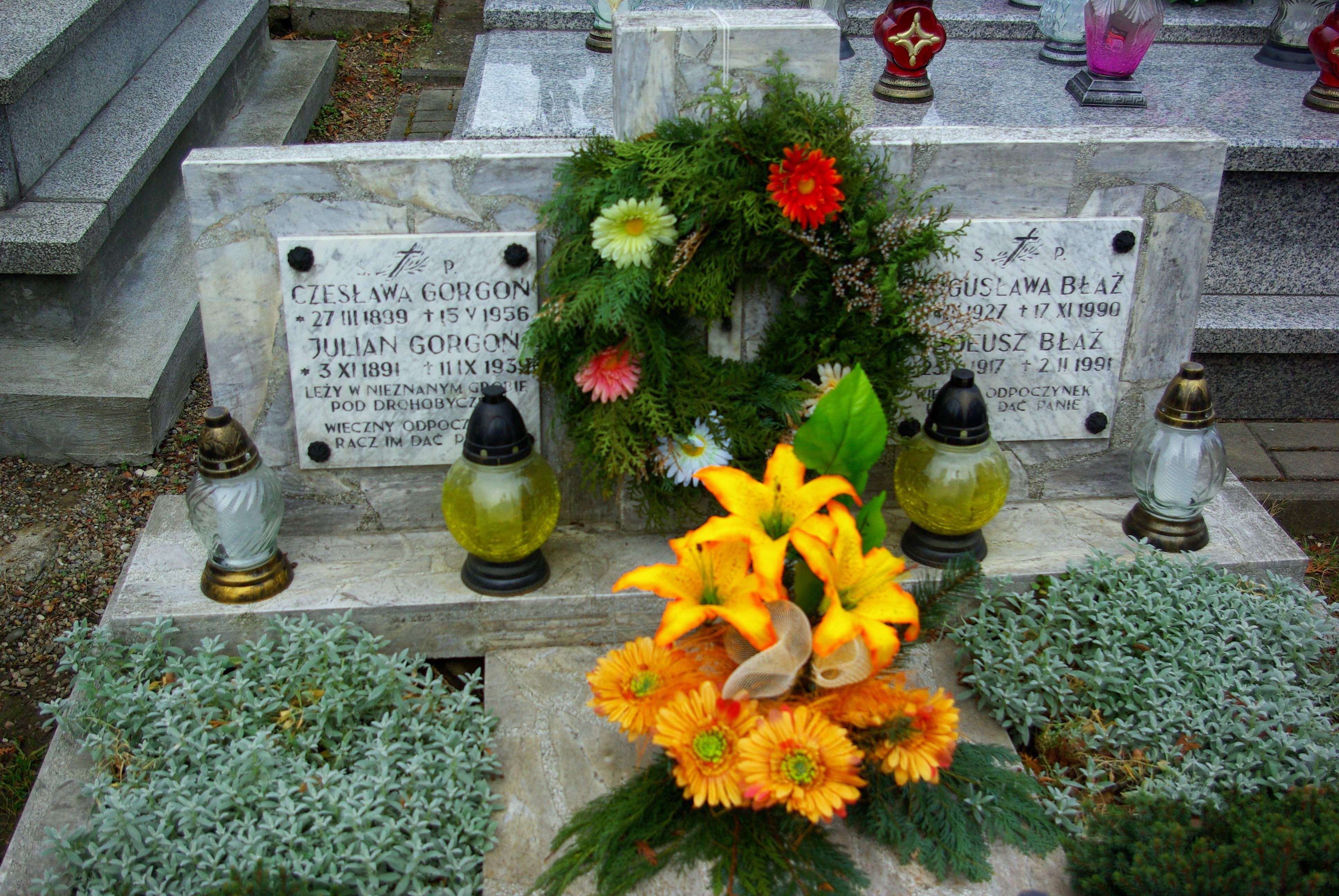 Grobowiec rodzin Gorgoniów i Błażów na Cmentarzu Centralnym w Sanoku. Symboliczne upamiętnienie Juliana Gorgonia.